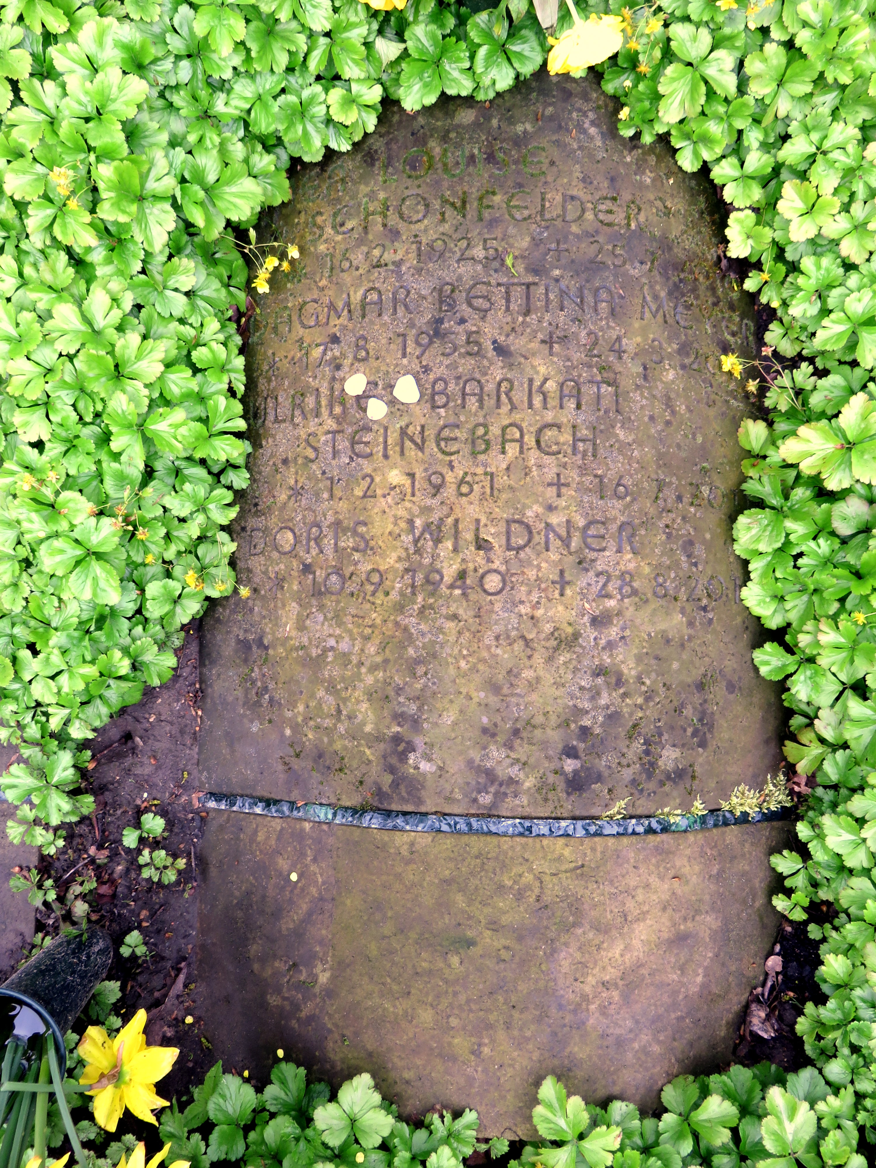 Grabstelle der Hamburger Hochschullehrerin Thea Louise Schönfelder im Bereich des Gartens der Frauen auf dem Ohlsdorfer Friedhof in Hamburg-Ohlsdorf.